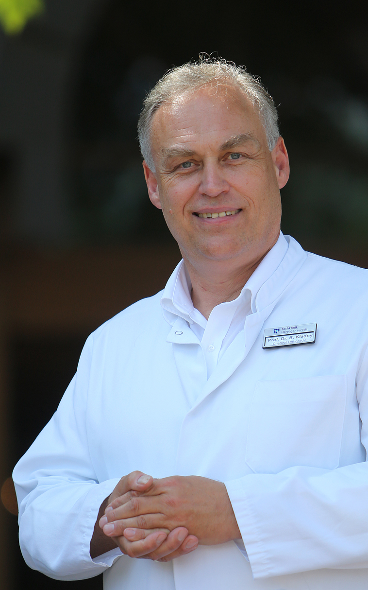 Bild Portrait Kladny Bernd